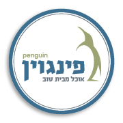 לוגו המסעדה